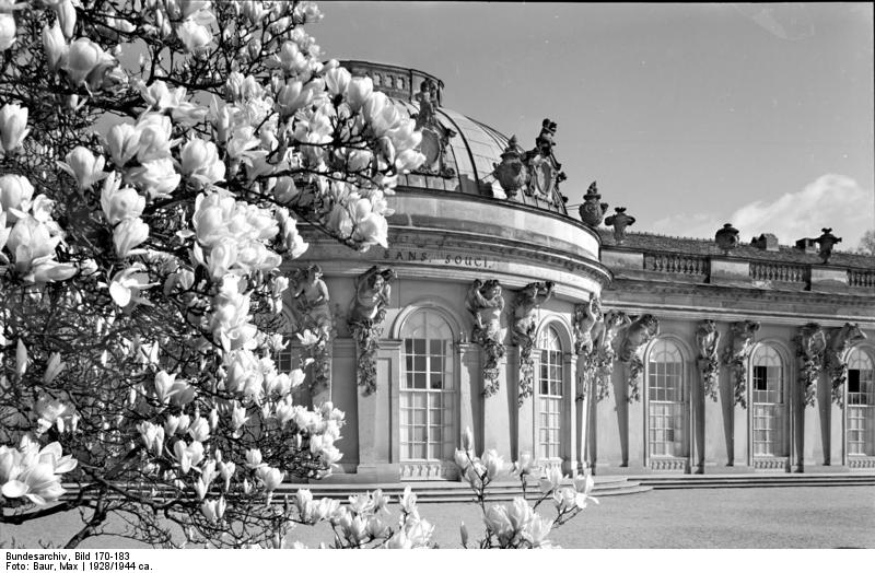 Potsdam.- Schloß Sans Souci (Sanssouci)